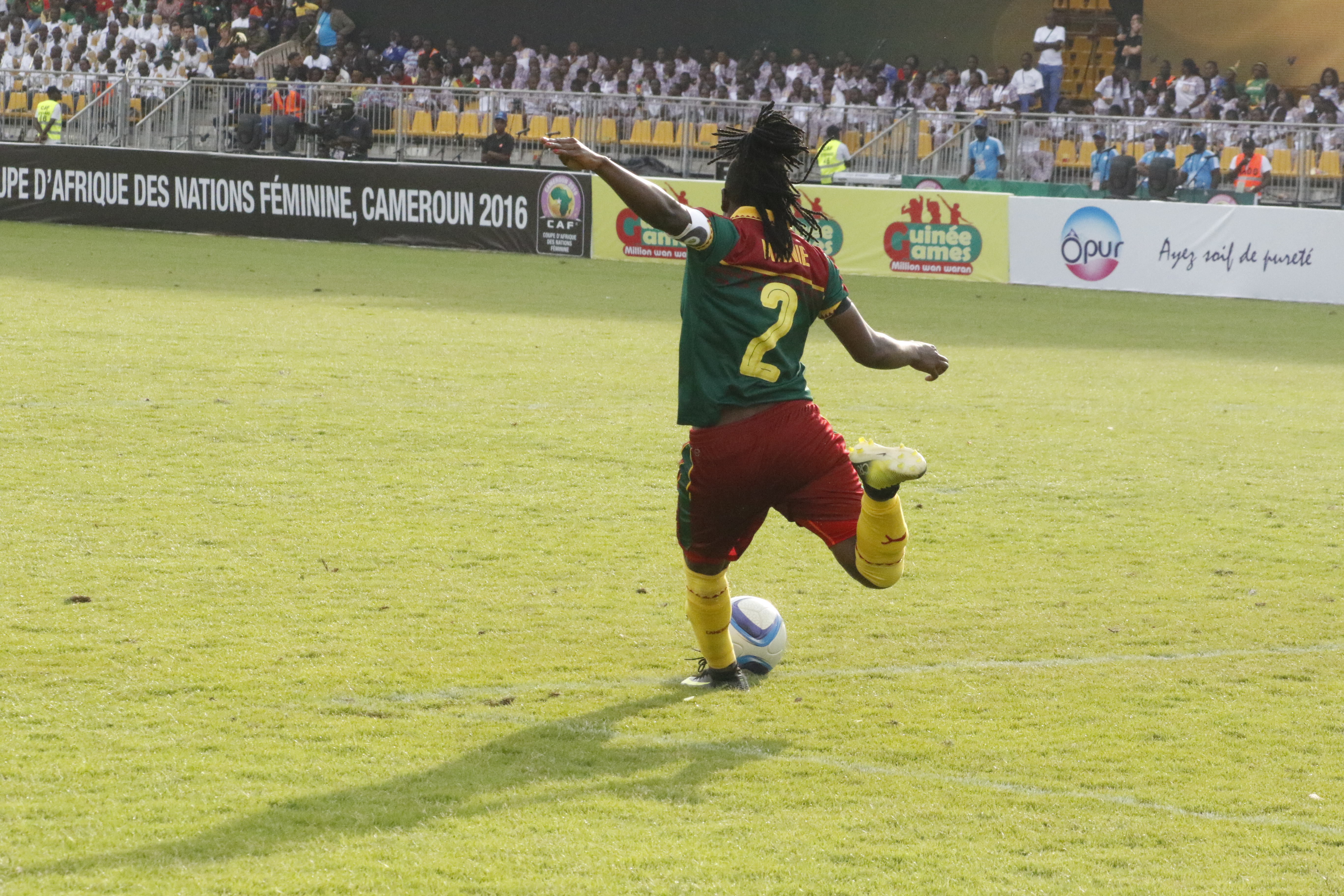 La Capitaine de l'équipe nationale des lionnes indomptables du Cameroun en pleine action lors de la finale de la coupe d'Afrique des Nations contre le Nigéria